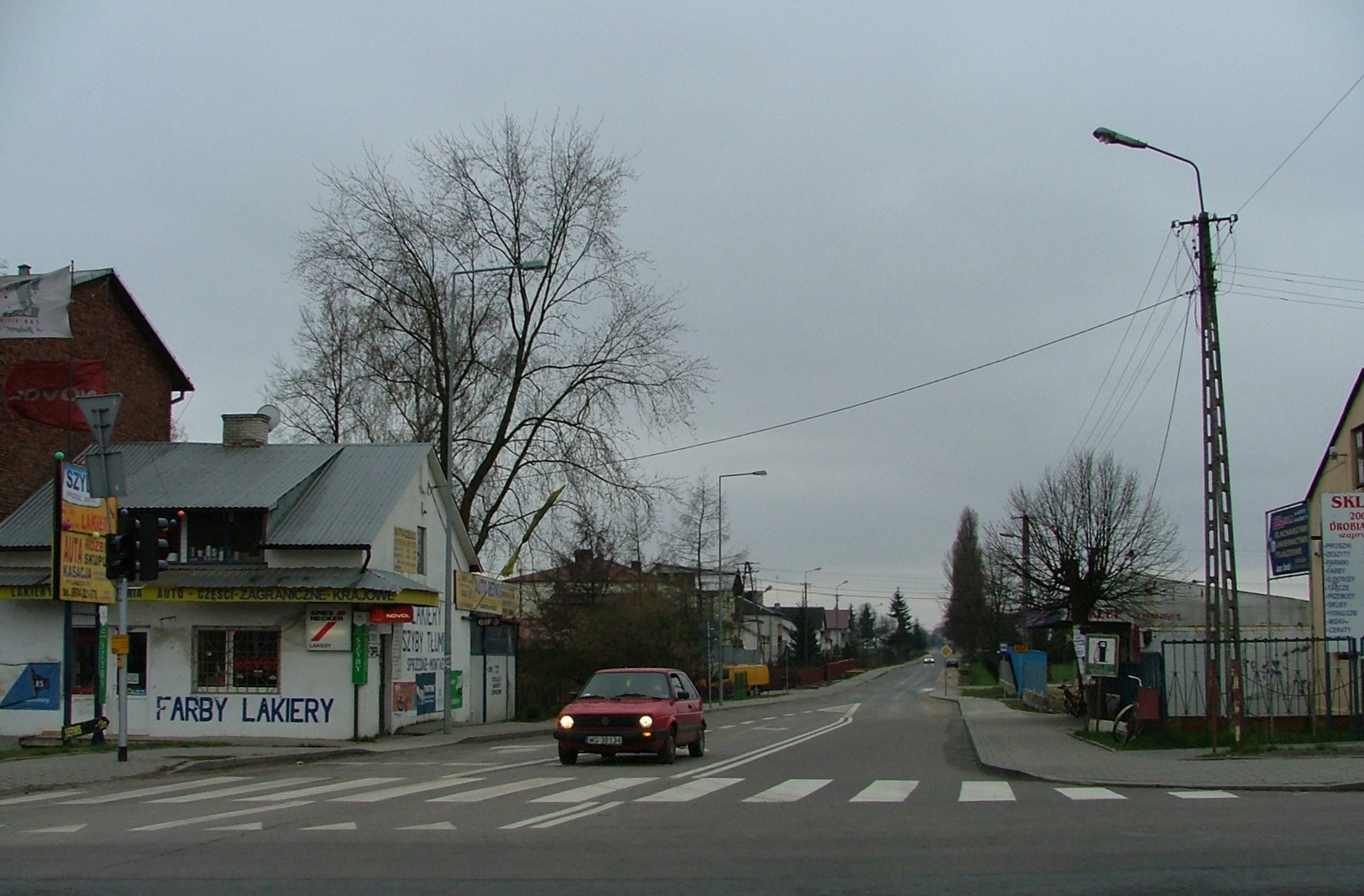 Gończyce, województwo mazowieckie, powiat garwoliński, gmina Sobolew